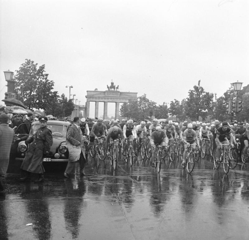 Zentralbild/Krueger 2.5.1959 Scharfer Start zur 1. Etappe "Rund um Berlin" vor dem Brandenburger Tor am 2. Mai 1959 Vor dem Brandenburger Tor in Berlin fanden sich die 108 Teilnehmer der XII. Internationalen Friedensfahrt Berlin-Warschau-Prag ein. UBz: Scharfer Start vor dem Brandenburger Tor in Berlin. In der Mitte (dunkles Trikot mit weißen Ärmeln) Kapitonow (Sowjetunion), der erste Prämiumspurtsieger der XII. Internationalen Friedensfahrt .